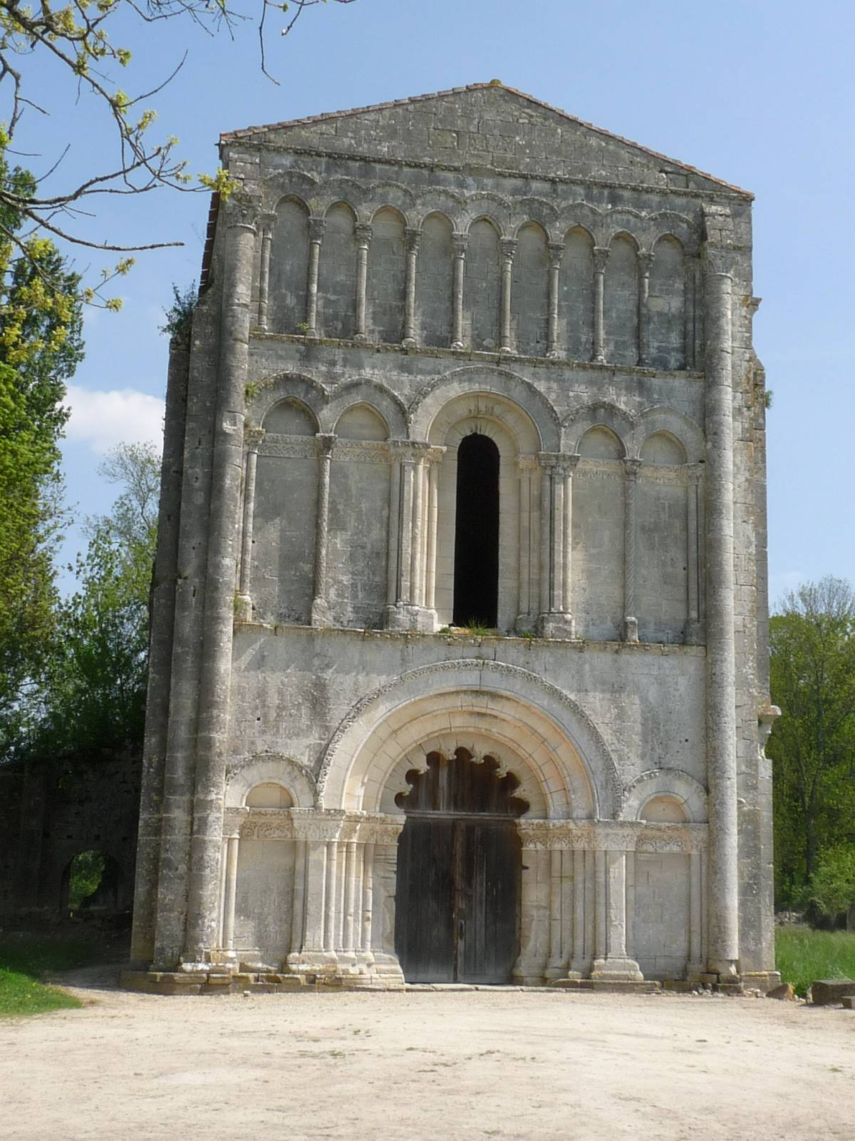 Abbaye de Châtre, St-Brice, Charente, France